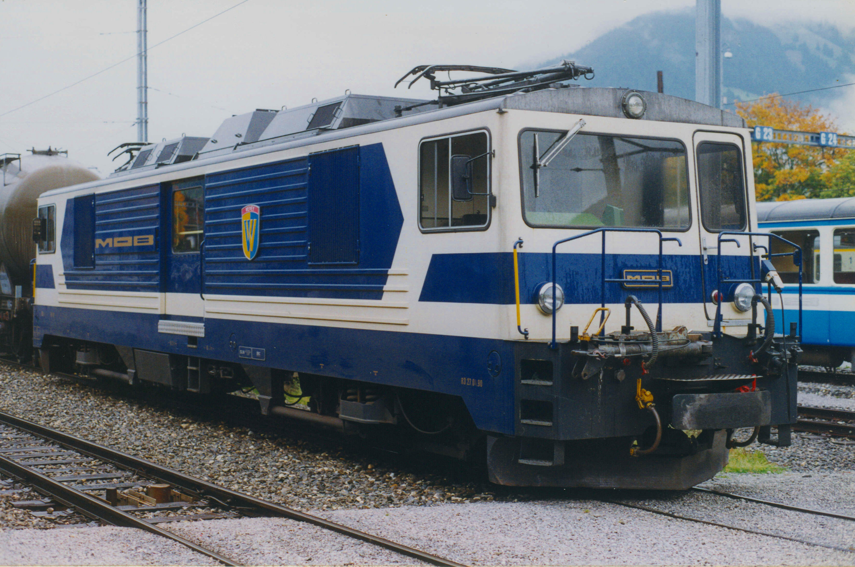 Lokomotiva "Vevey" dráhy MOB v Zweisimmen